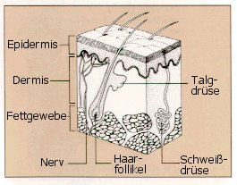 Hautschnitt